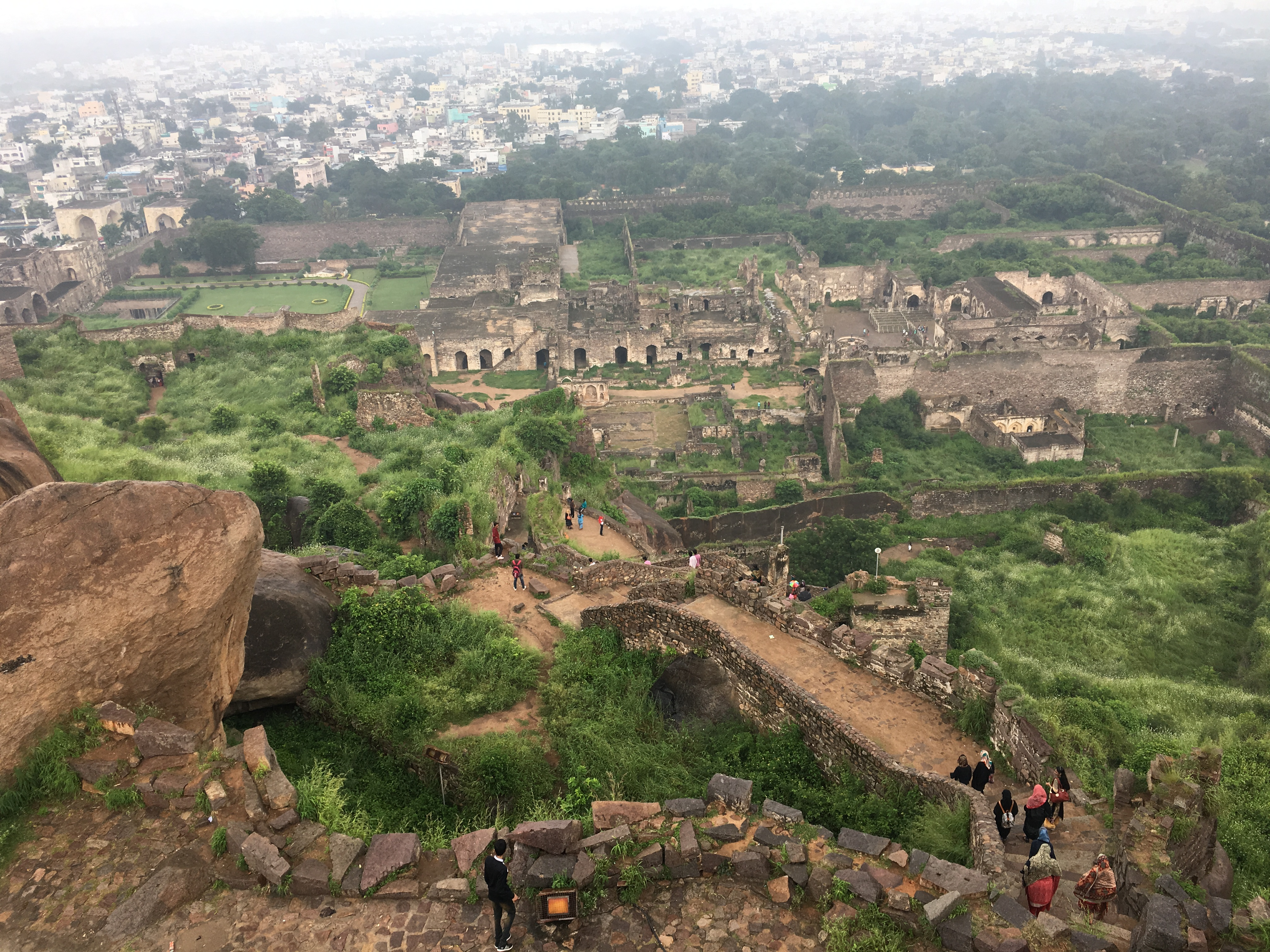 గోల్కొండ దుర్గం - పై నుండి దృశ్యం